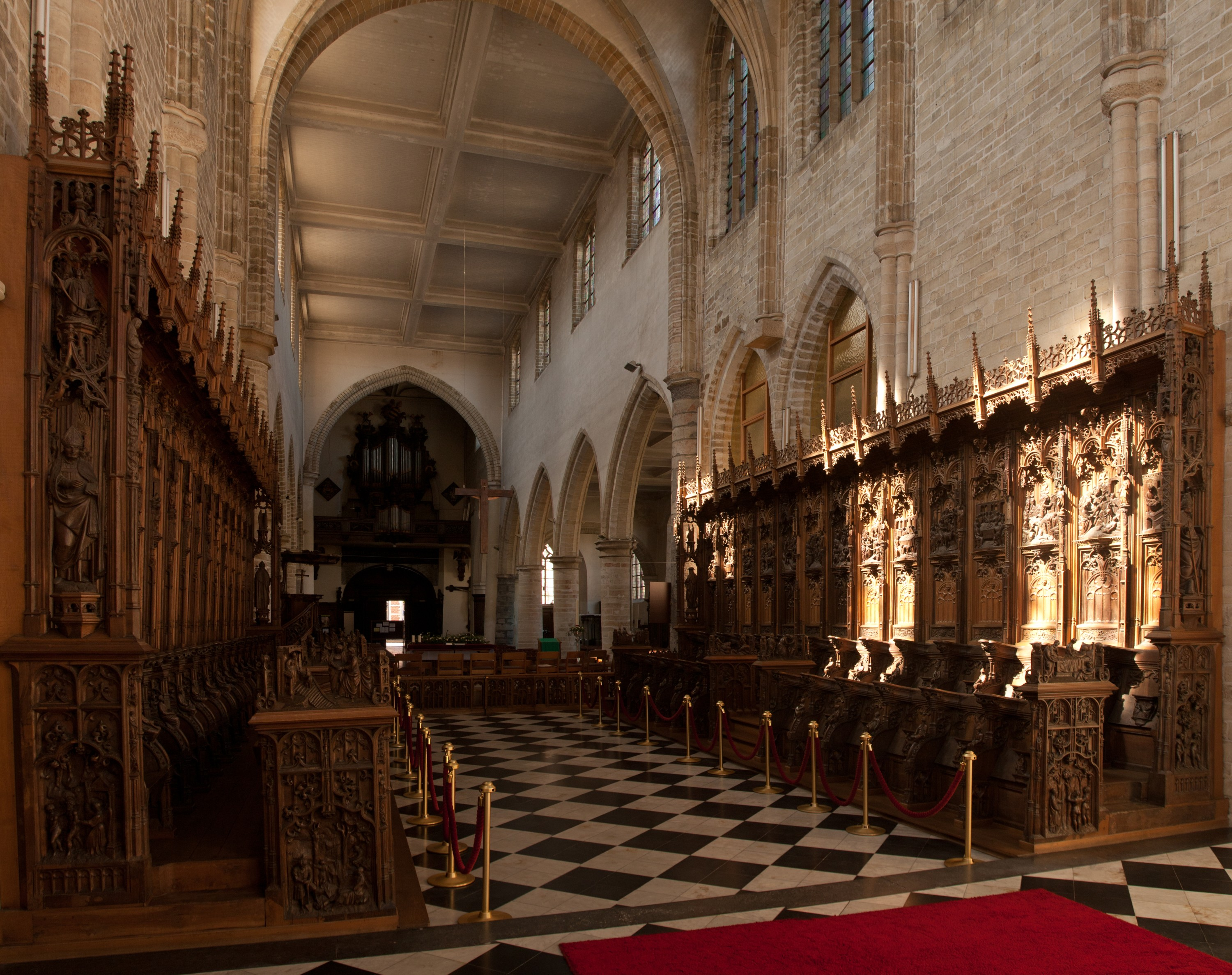 Zicht op de gotische koorbanken van de Sint Geertruikerk te Leuven